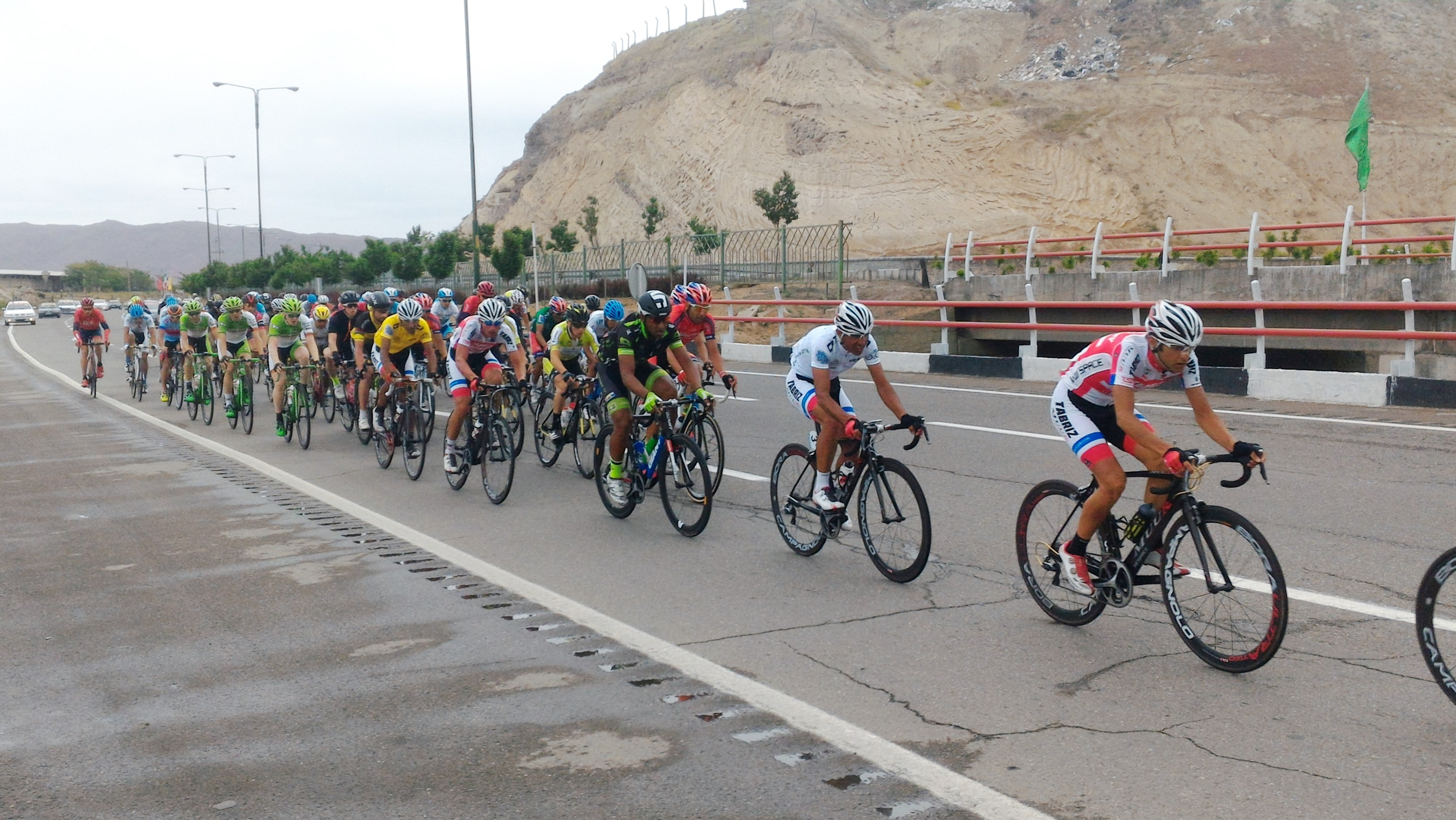 مرحله پایانی تور دوچرخه سواری ایران (آذربایجان) در سال 1395.